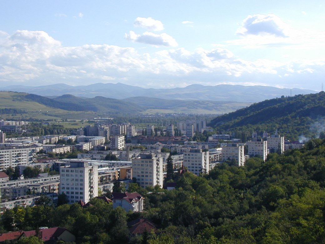 Hoia Forest and Grigorescu district, Cluj-Napoca